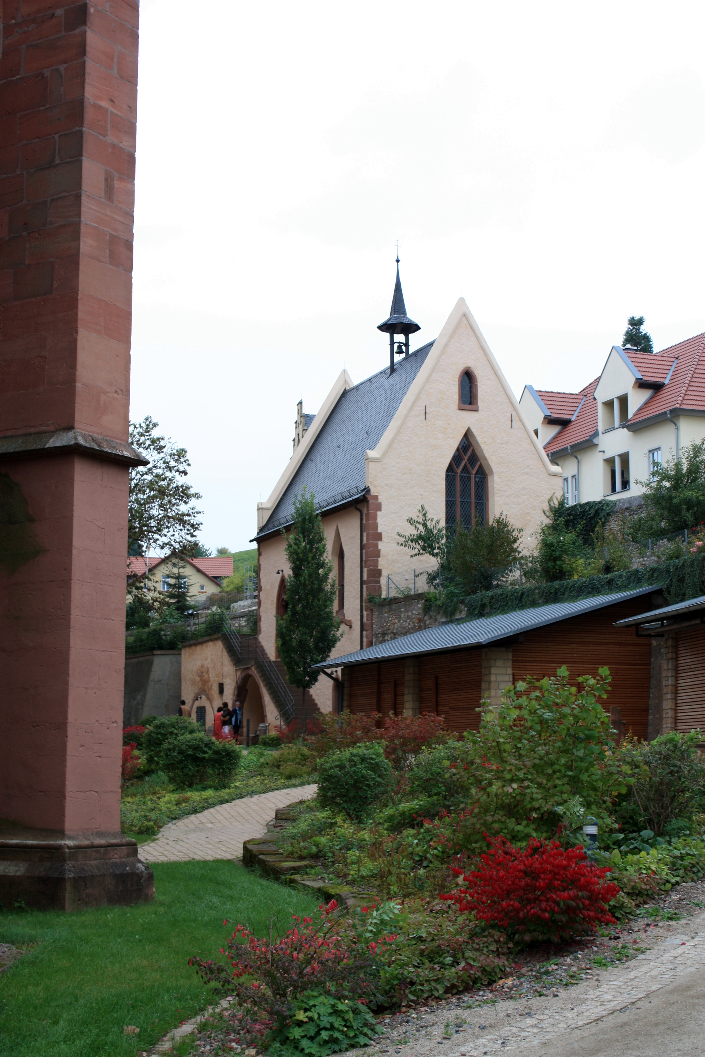 Totenkapelle aus dem 14. Jahrhundert, Gebeinhaus von etwa 20.000 Toten aus den Jahren 1400 bis 1750